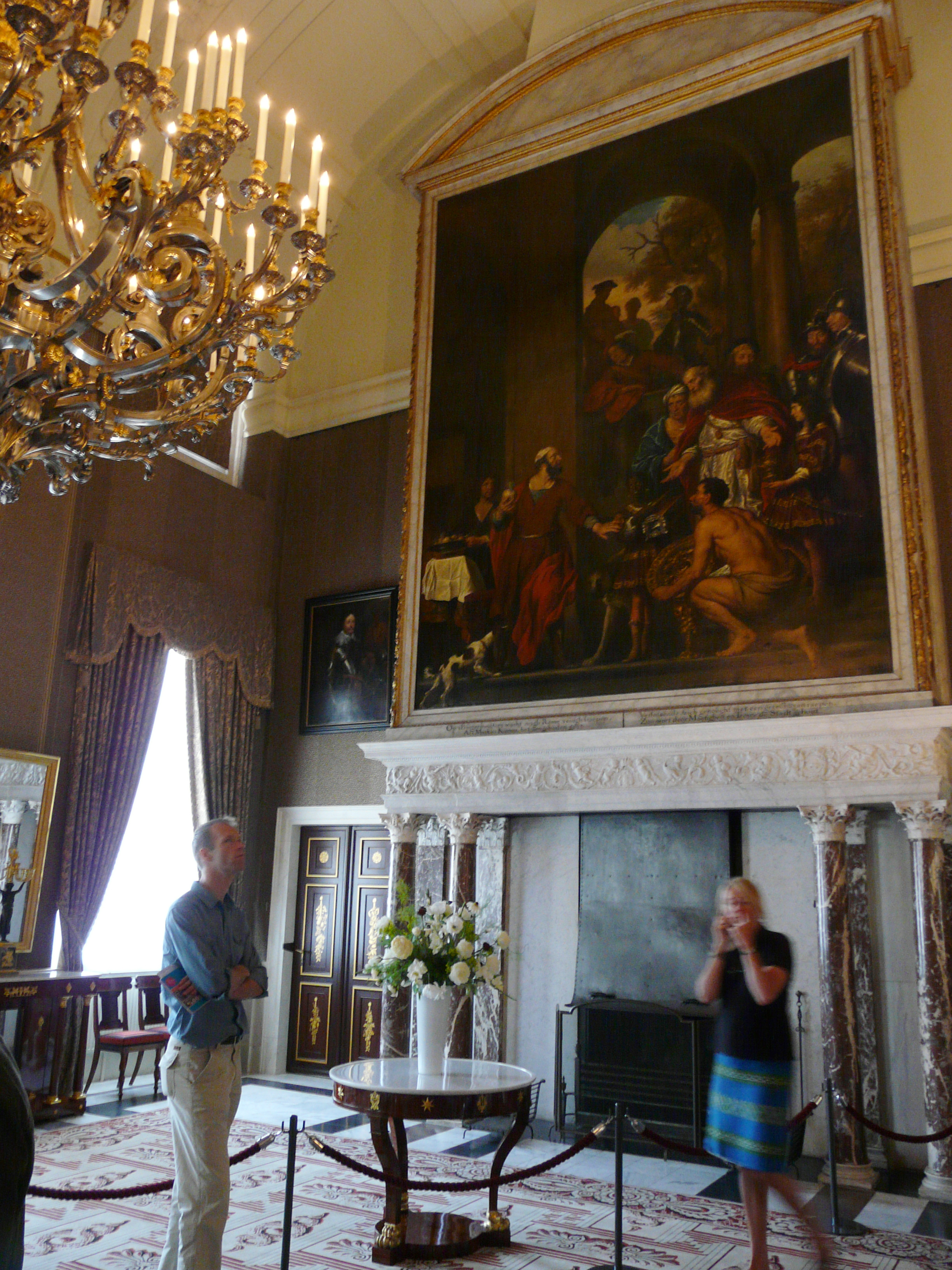 Paleis op de Dam in Amsterdam